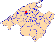 Localització de Mancor de la Vall a Mallorca